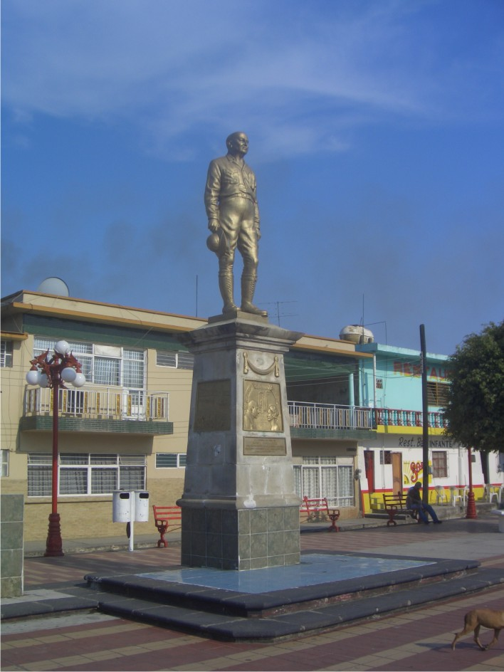 Monumento a Roberto García Loera en el parque central de Carlos A. Carrillo, Veracruz.